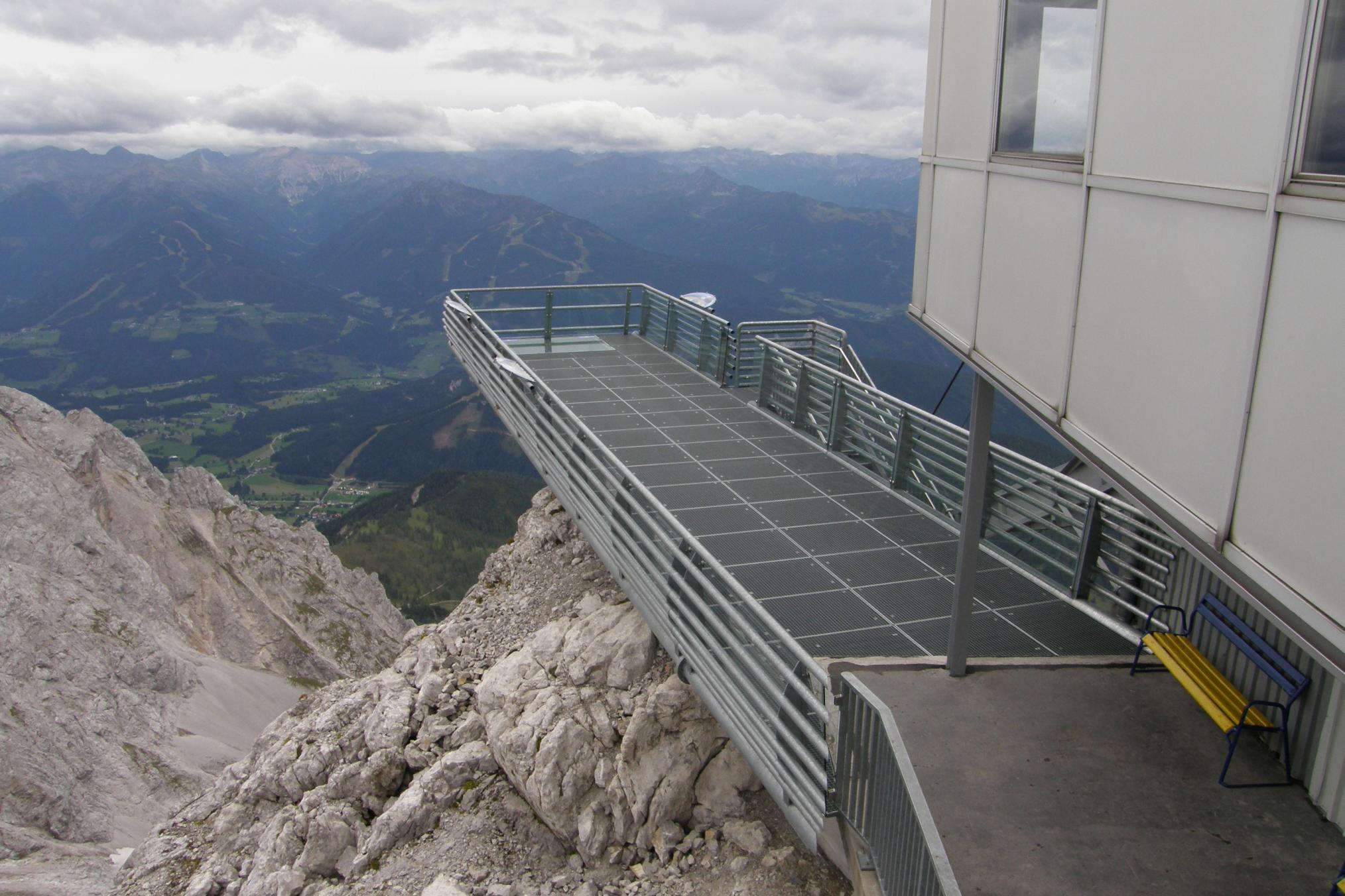 Dachstein Skywalk